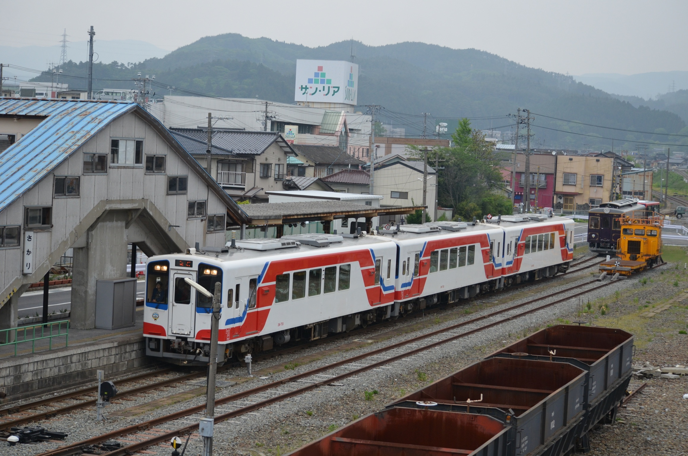 三陸鉄道南リアス線 36-700系